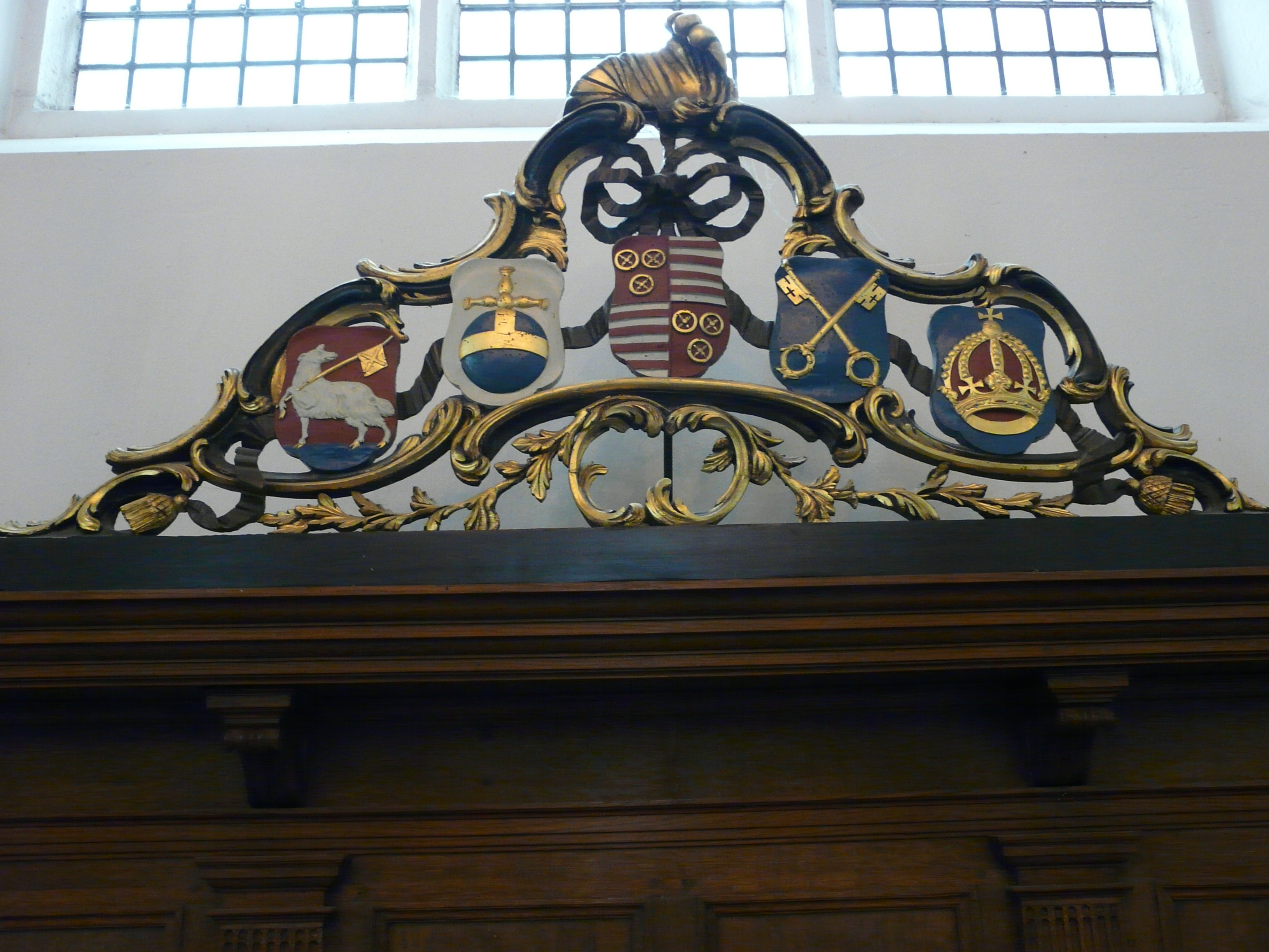 coats of arms of the former five chapters in Utrecht (NL)